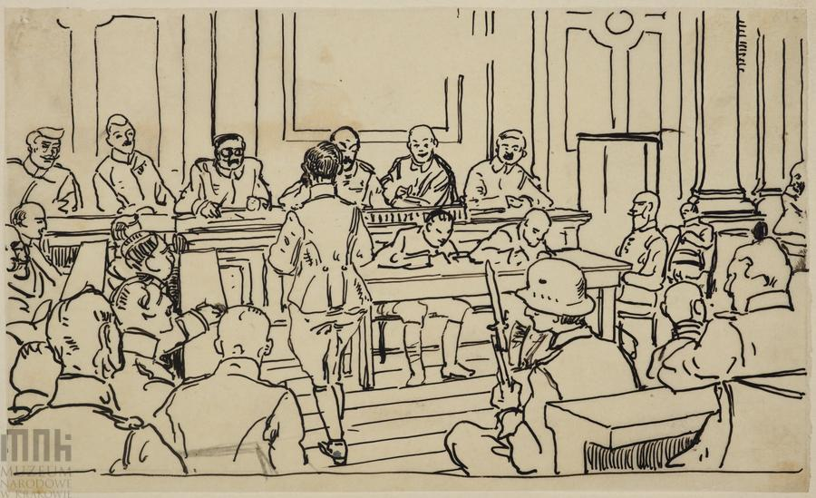 Rysunek "Sala sądowa podczas procesu żołnierzy II Brygady Legionów Polskich w Marmaros - Sziget w roku 1918". Autor: Stanisław Janowski.